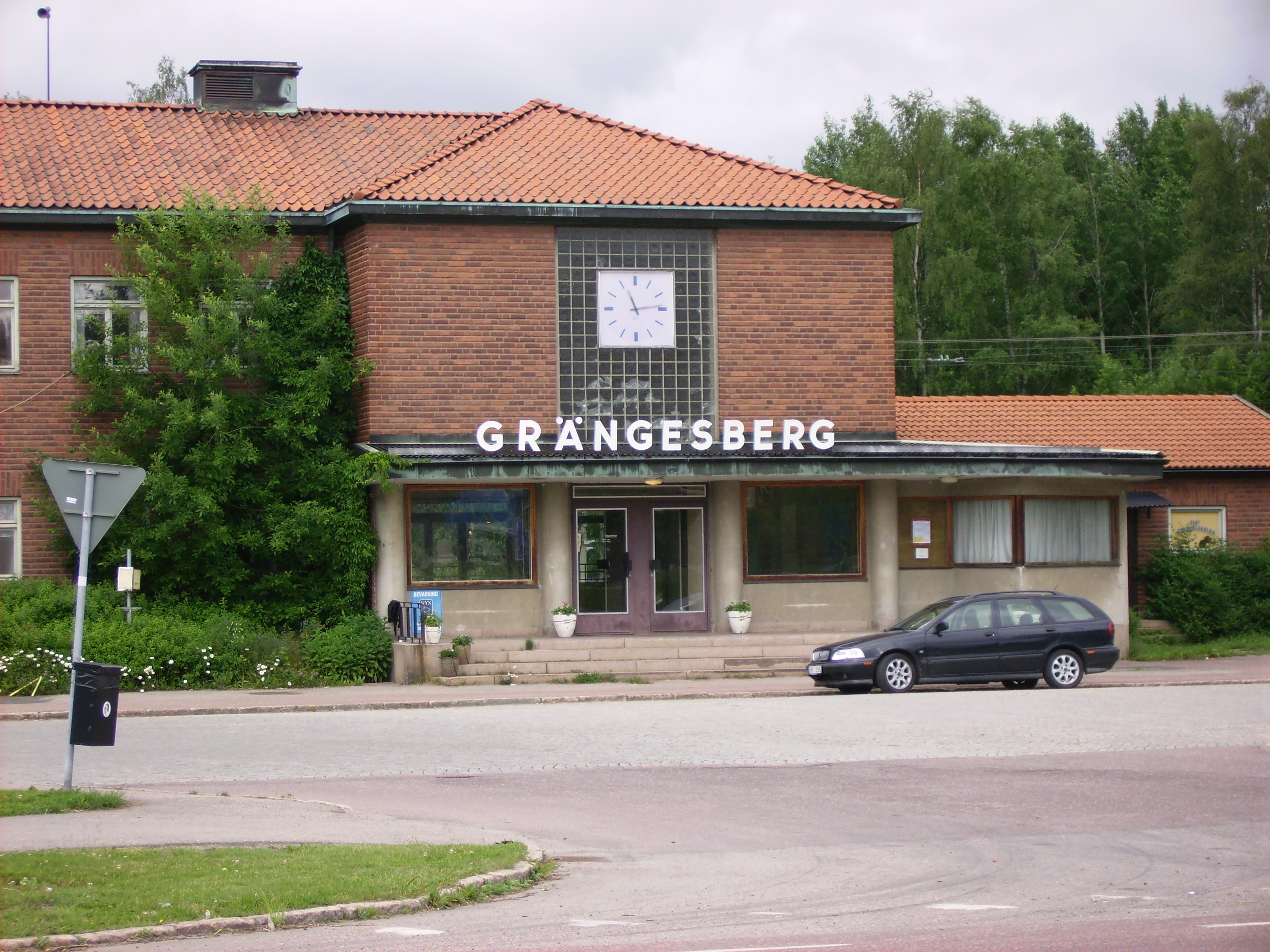 Grängesberg centralstation